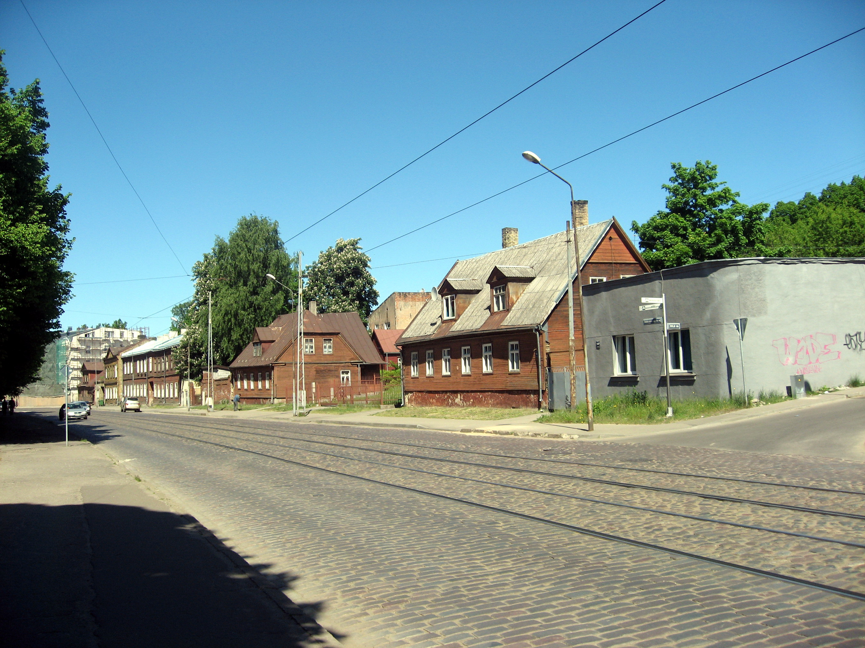 Riga, Moskevská ulice